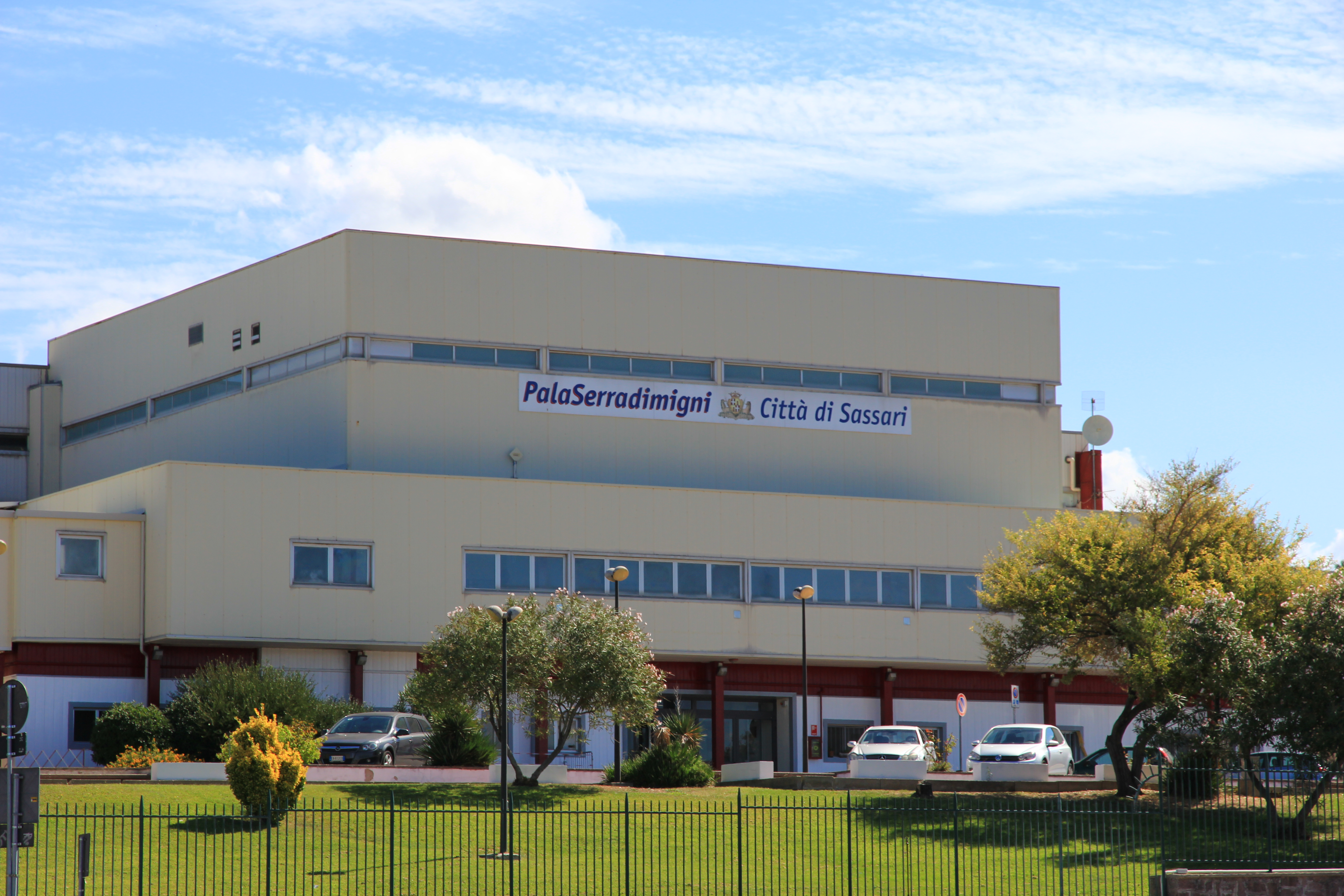 Sassari